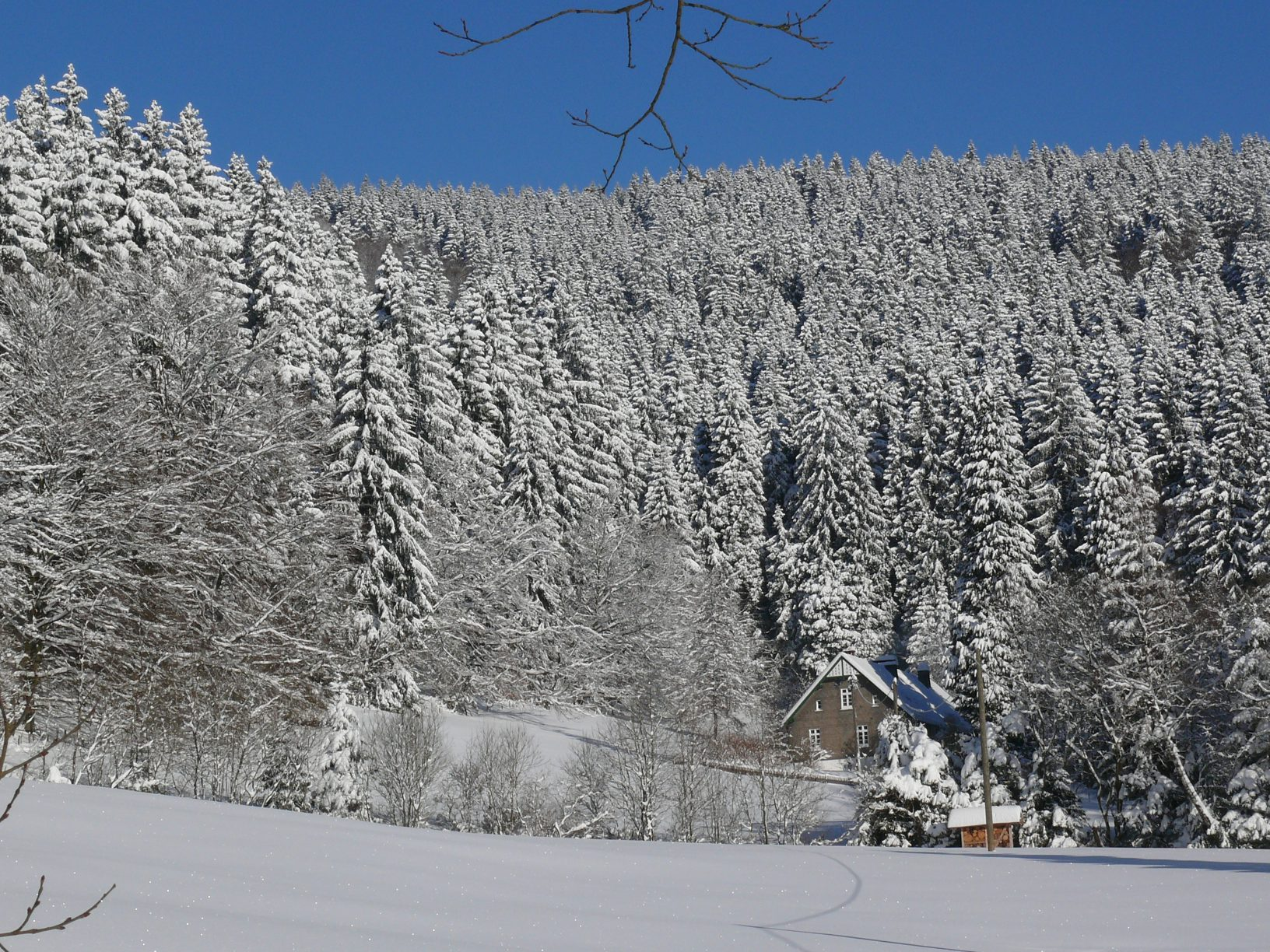 Altes Forsthaus Rehsiepen im Schmallenberger Sorpetal (Hochsauerland)